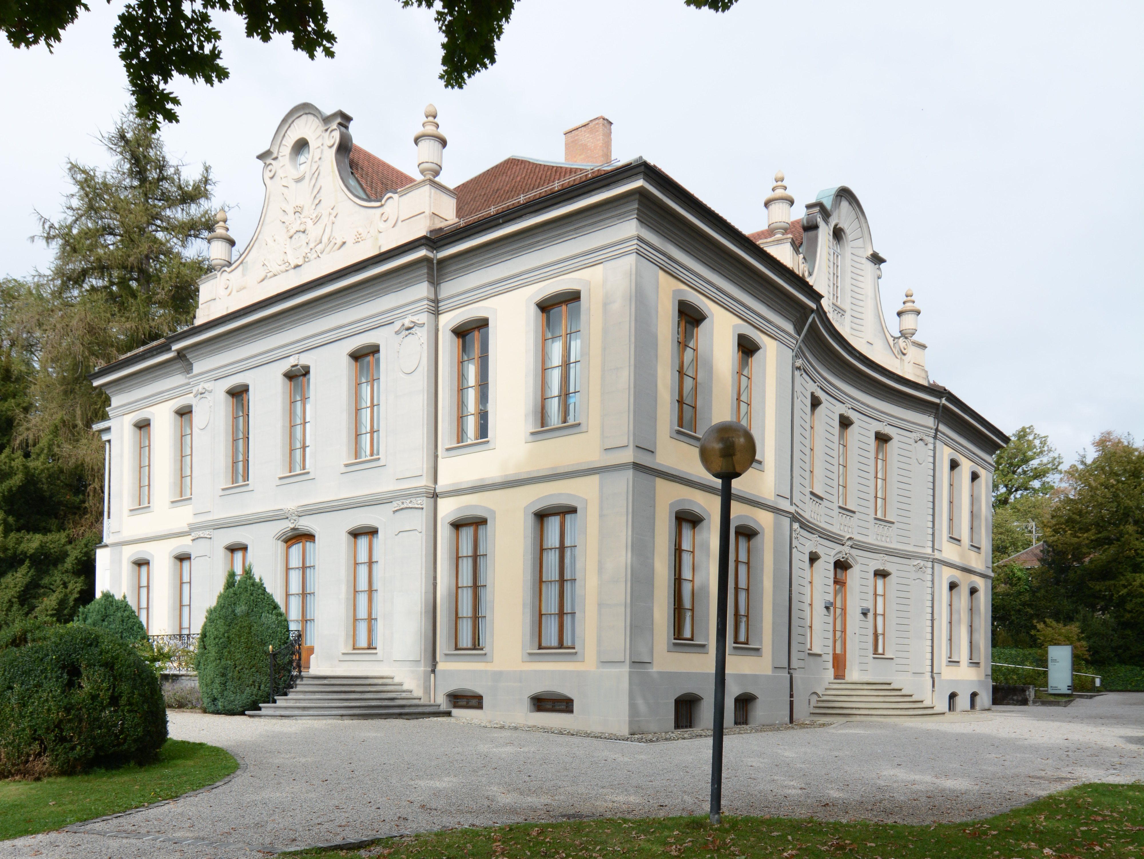 Haus für Henri de Mollins (1729-1811) Lausanne, 1780–1783. Architekt: Abraham Fraisse